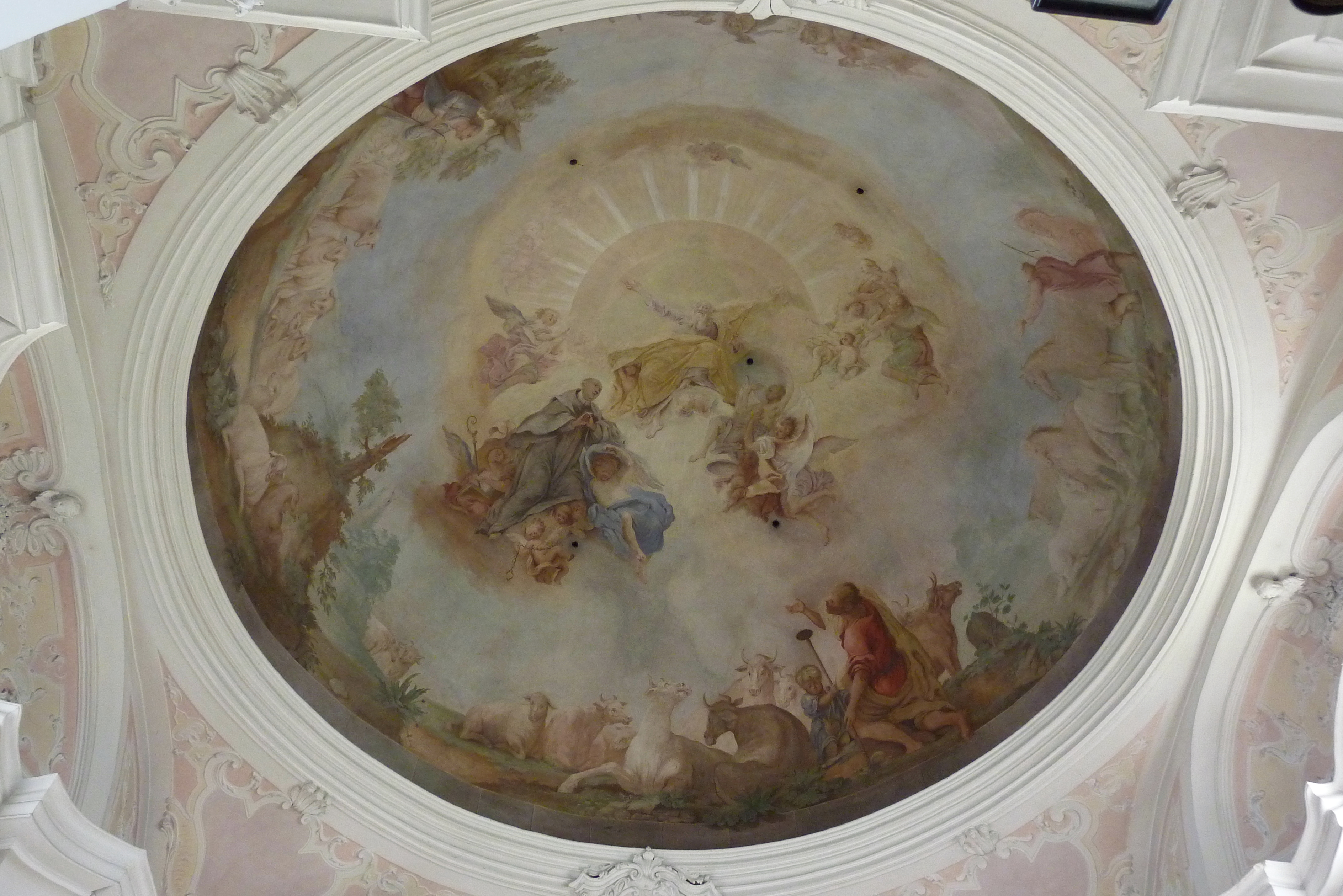 katholische Stadtpfarrkirche St. Martin in Gundelfingen an der Donau